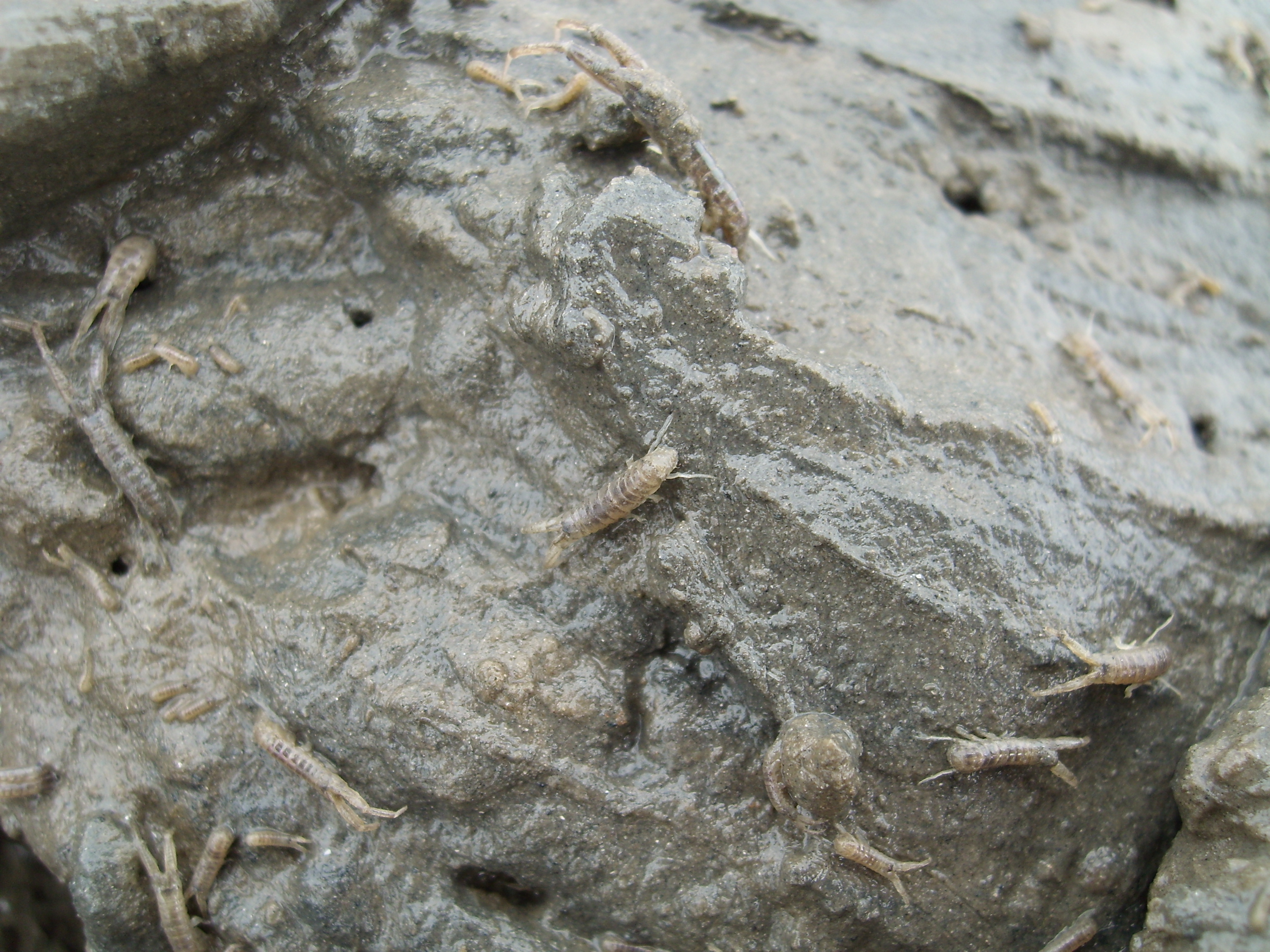 Schlickkrebse (Corophium volutator) im Wattenmeer vor Friedrichskoog, Schleswig-Holstein